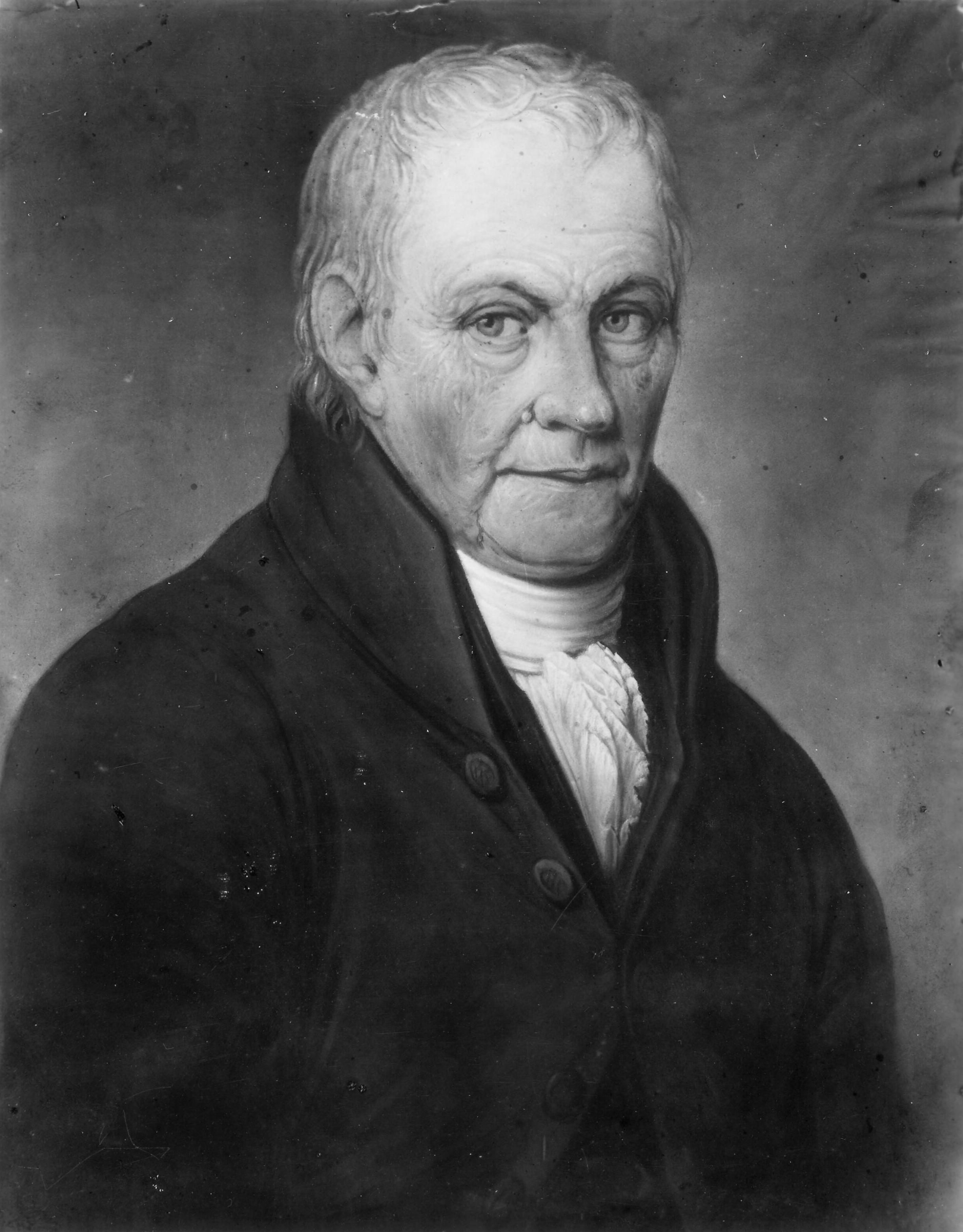 Scato Trip (1742-1822) (detail van een grotere afbeelding)